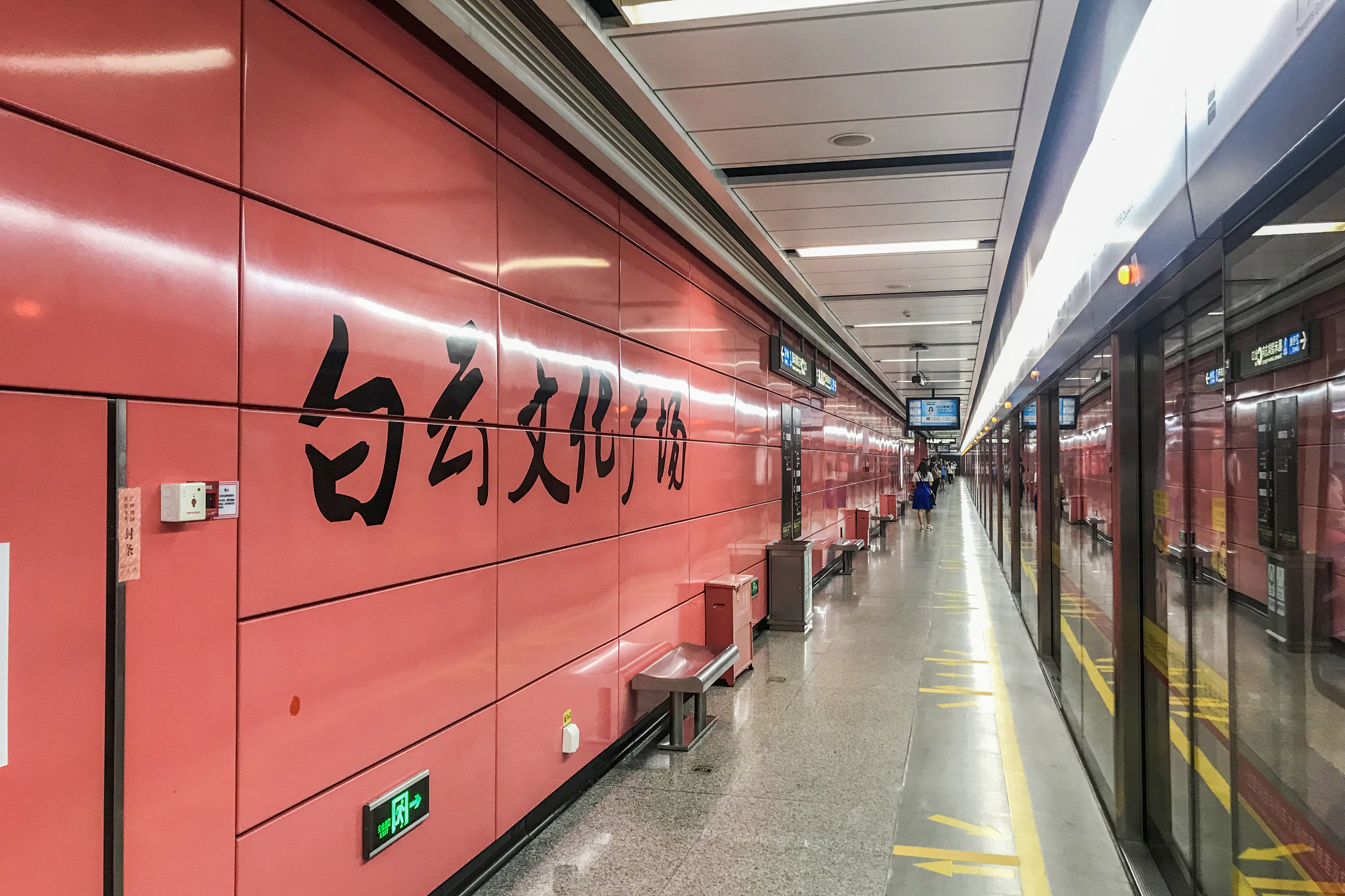 广州地铁白云文化广场站